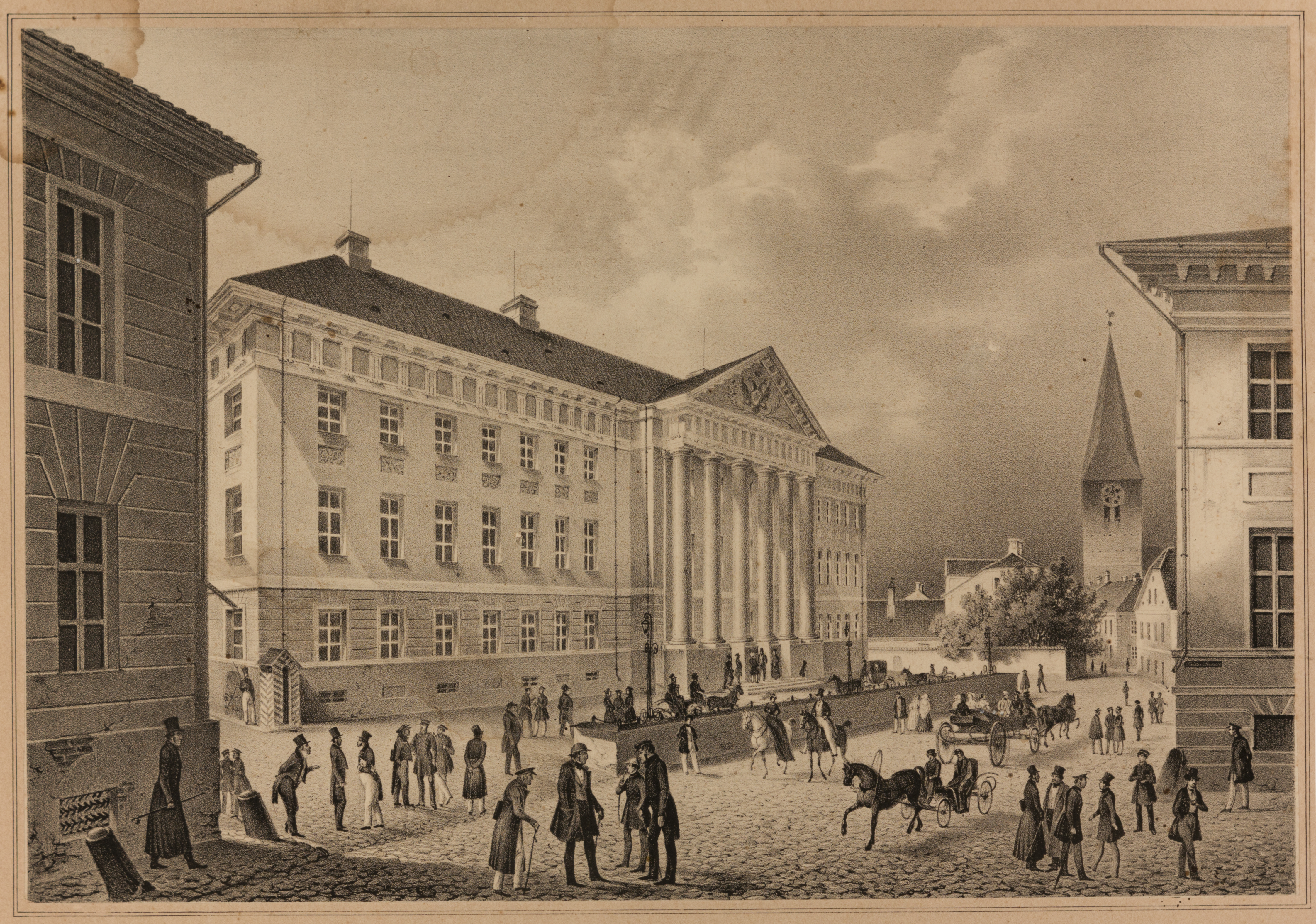 "Tartu Ülikooli peahoone". 1845. Litograafia paberil. Kujutise kõrgus 24,5 cm ja laius 36,0 cm; kõrgus 30,5 cm (ava) ja laius 40,0 cm (ava). MUIS: TKM TR 15970 G 4538 This image on crowdsourcing geotagging platform Ajapaik